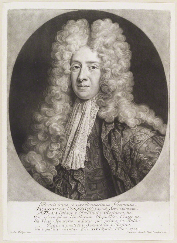 Francesco Cornaro, venetian ambassador in London 1706-1709